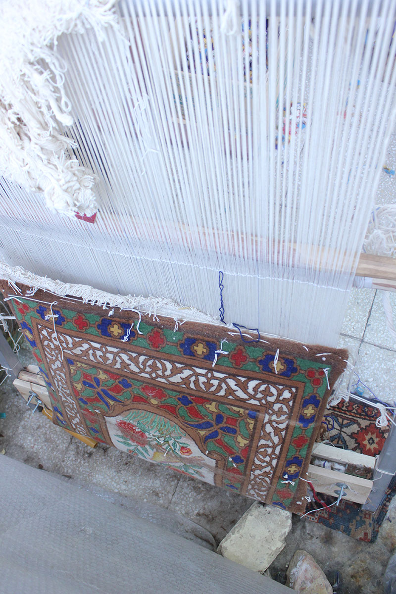 فرش اصفهان